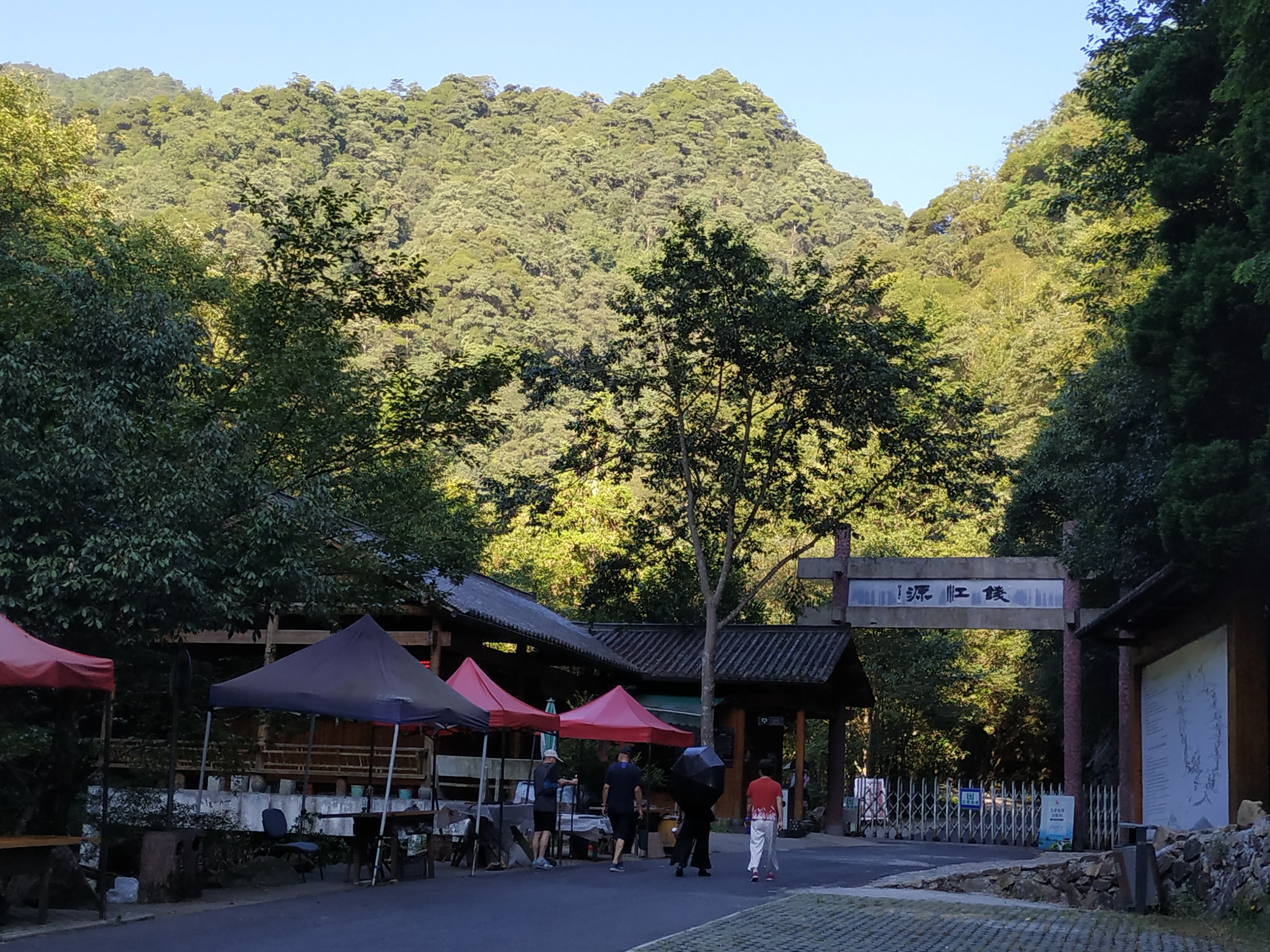 开化·钱江源国家森林公园